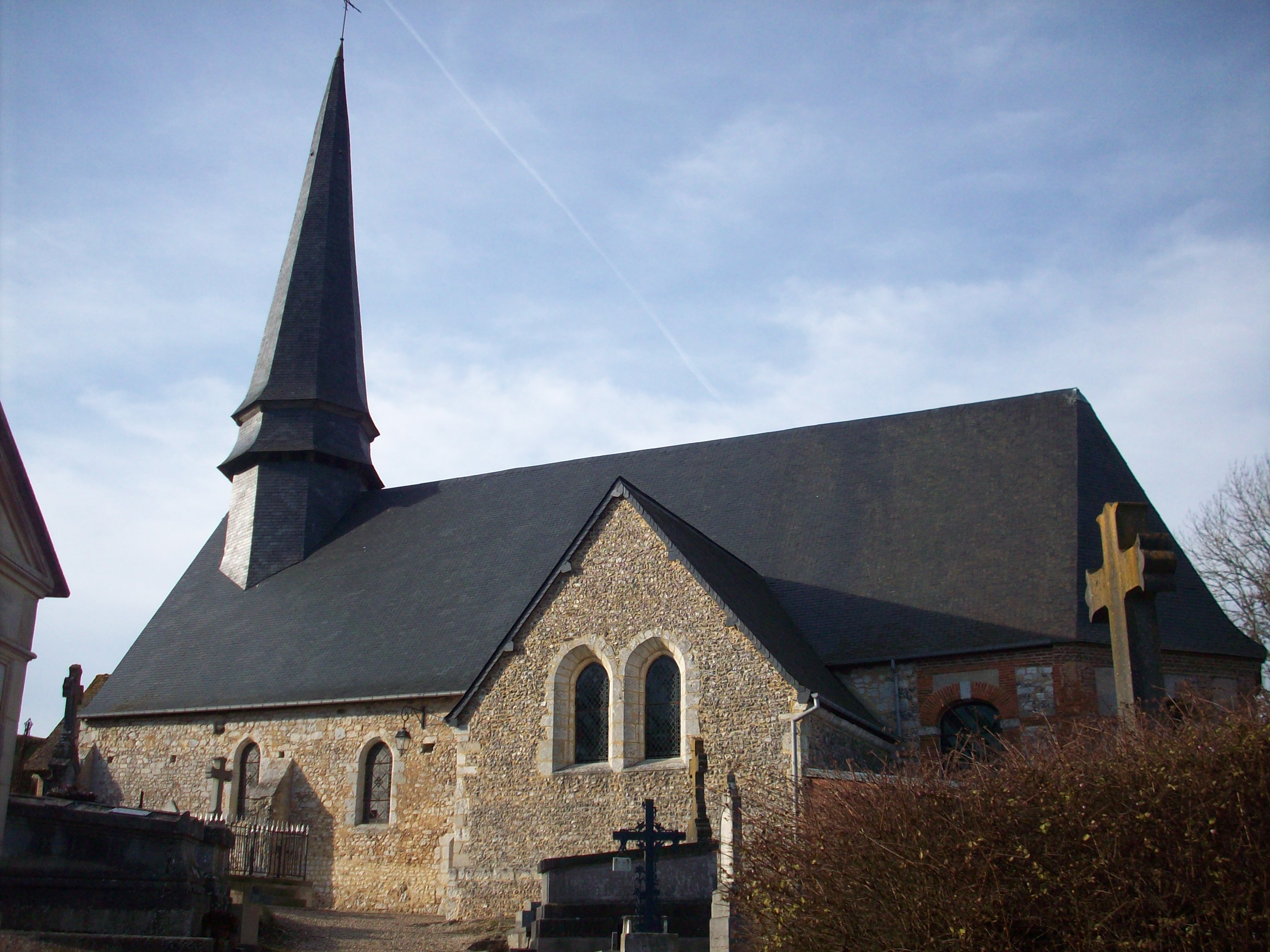 Église Saint-Martin de Bézu-la-Forêt